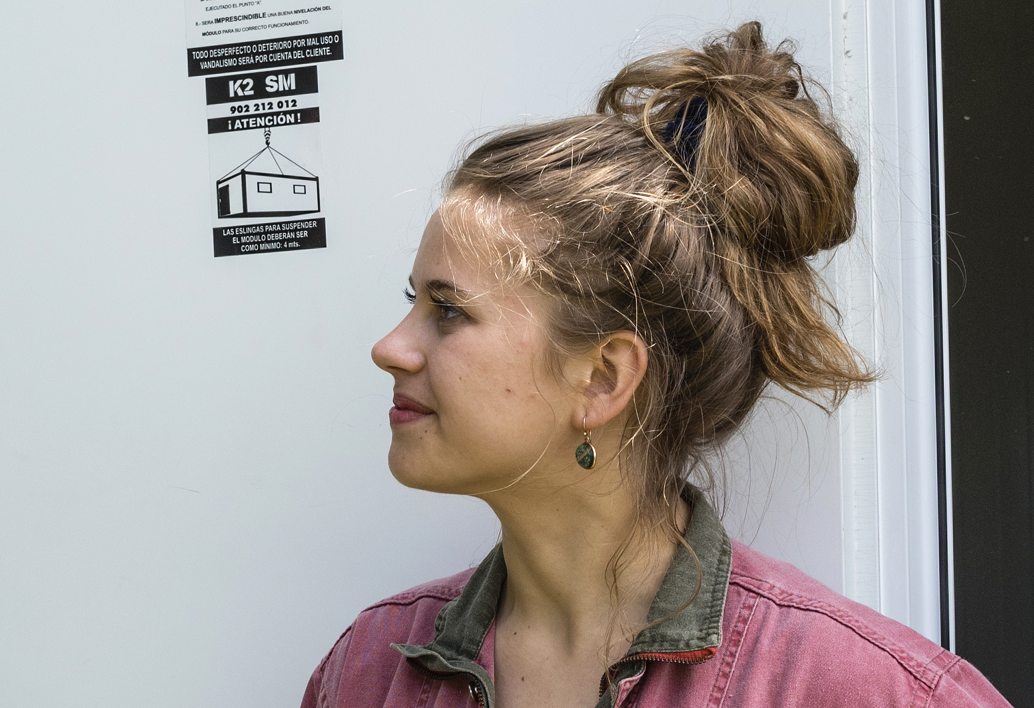 _DC73260